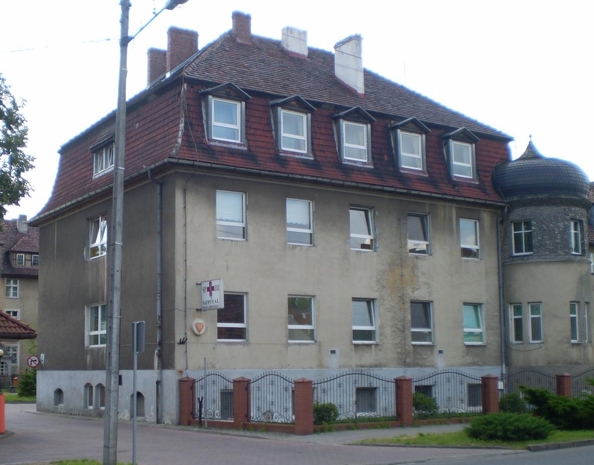 Gubin, ul. Śląska 35 - dom, szpital, pocz. XX wieku